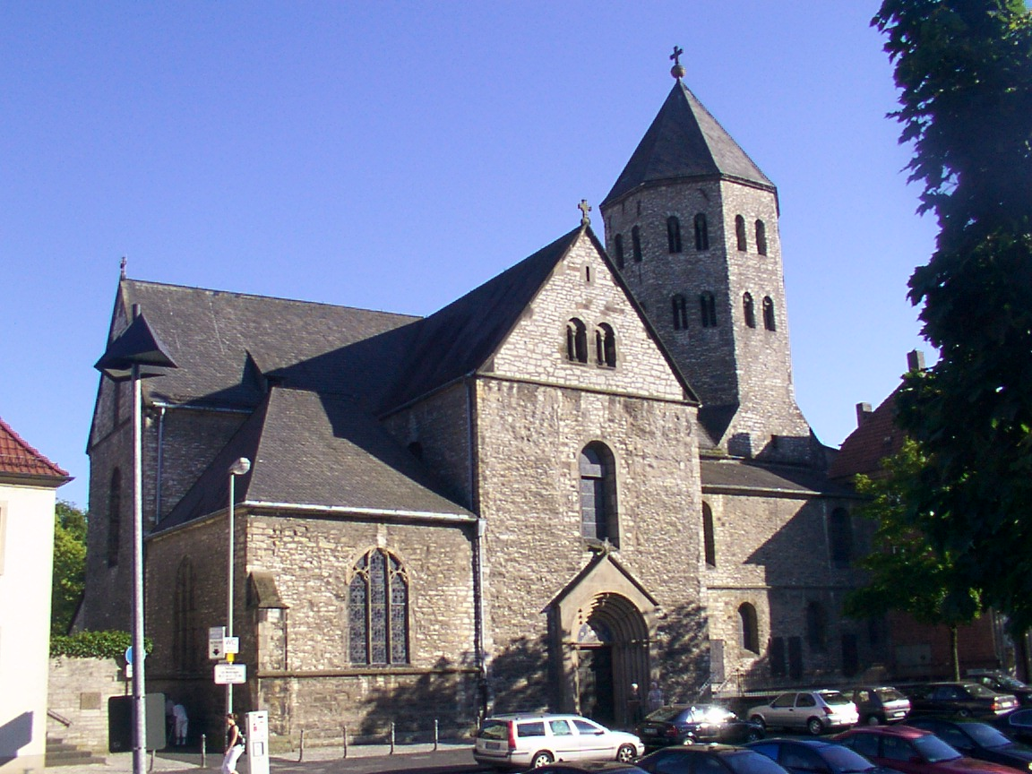 Paderborn: katholische Gaukirche zum heiligen Ulrich - Pfarrkirche der Innenstadtpfarrei Sankt Liborius Paderborn; romanische Pfeilerbasilika, erbaut in der zweiten Hälfte des 12. Jahrhunderts; von 1229 bis 1810 Klosterkirche.